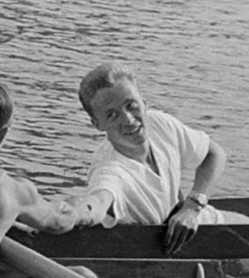 Europese roeikampioenschappen Bosbaan, Duitse twee met geluk gewenst door Rus twee met op voorgrond. ID, ID2